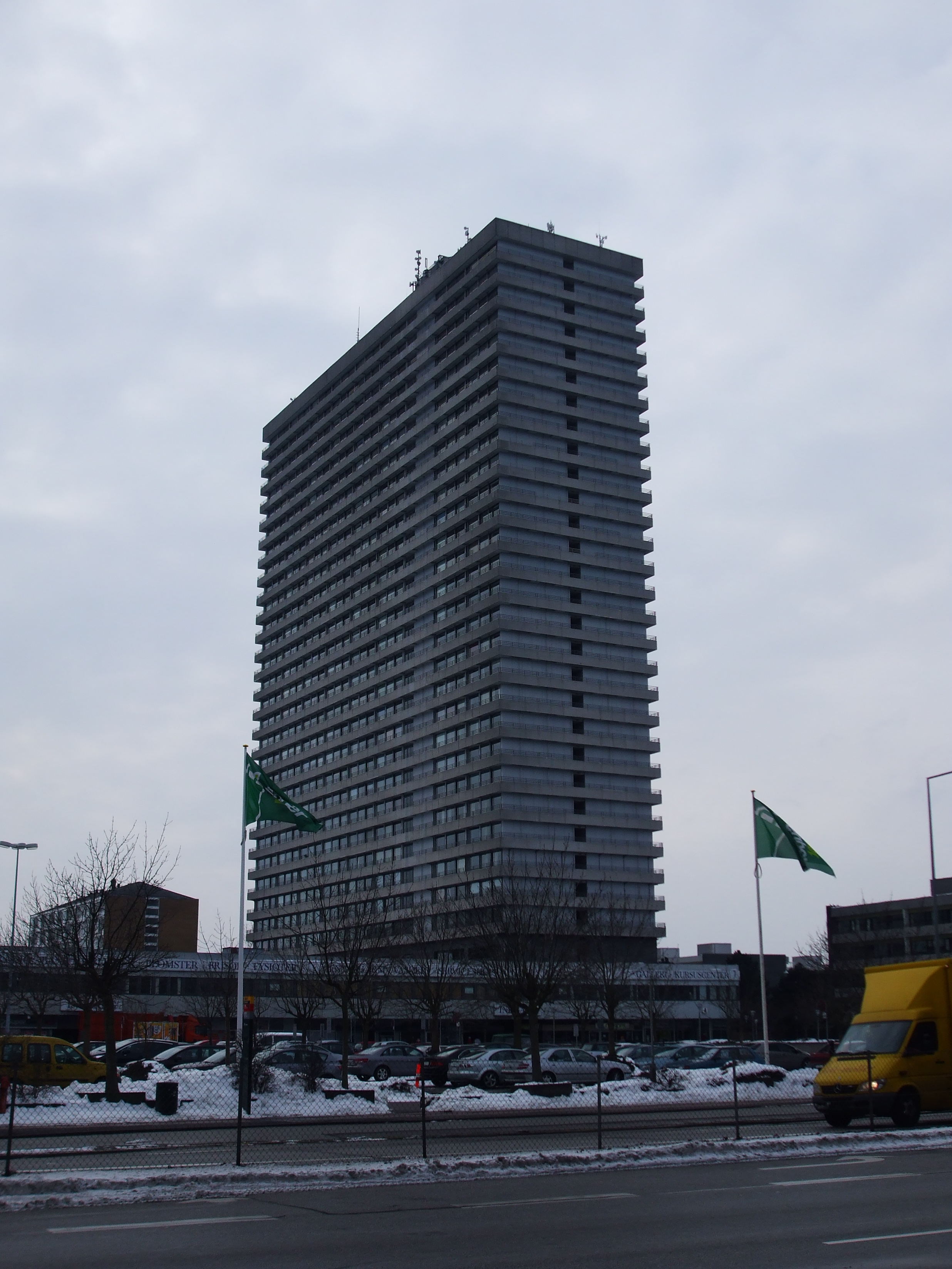 Domus Vista, Frederiksberg, set fra Roskildevej.